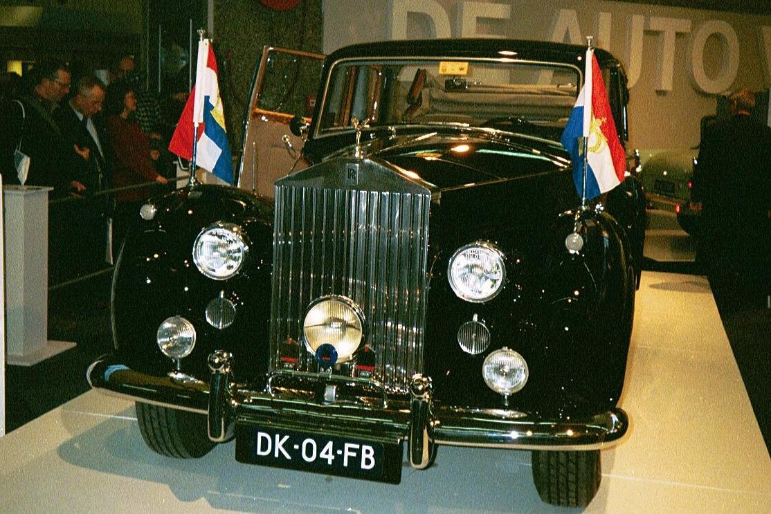 Rolls-Royce Silver Wraith Limousine State Landaulette, de Rolls Royce waarin ZKH Willem-Alexander van Oranje en HKH Máxima Zorreguieta gereden werden naar hun trouwerij